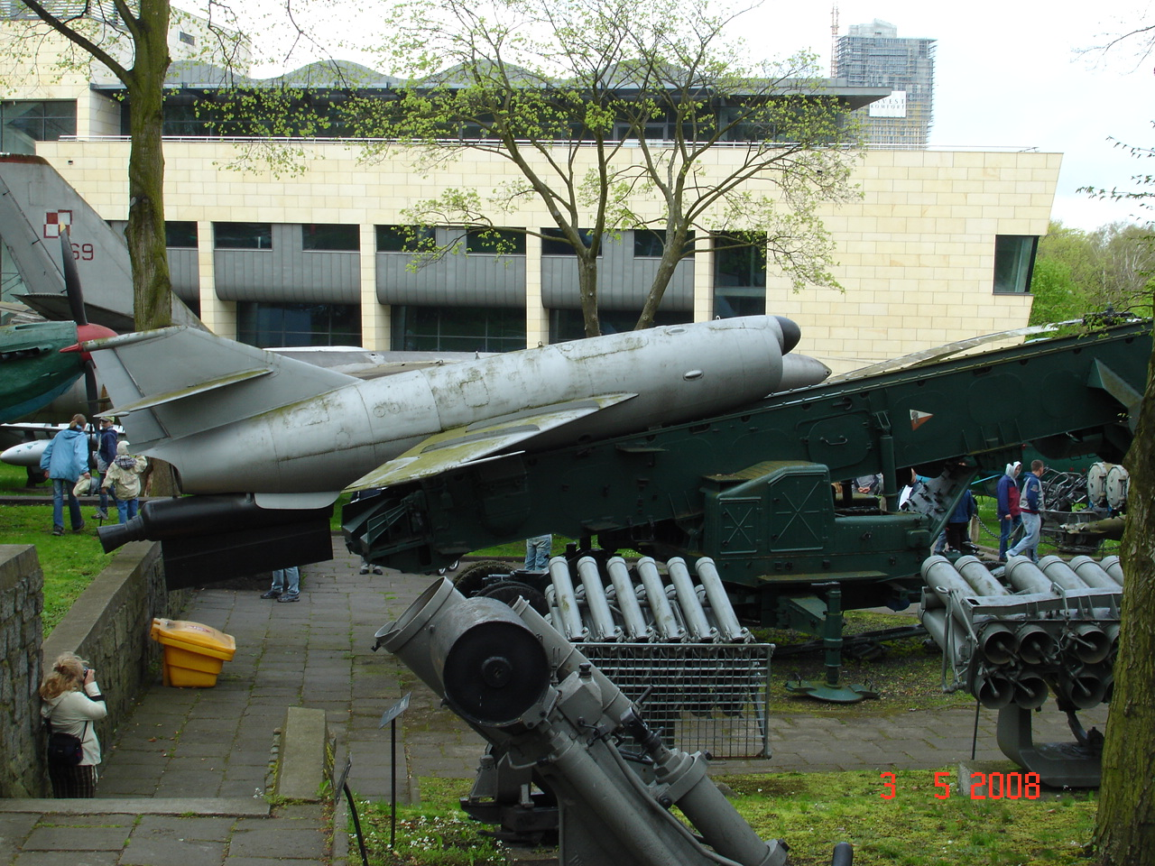 Muzeum Marynarki Wojennej Rzeczypospolitej Polskiej